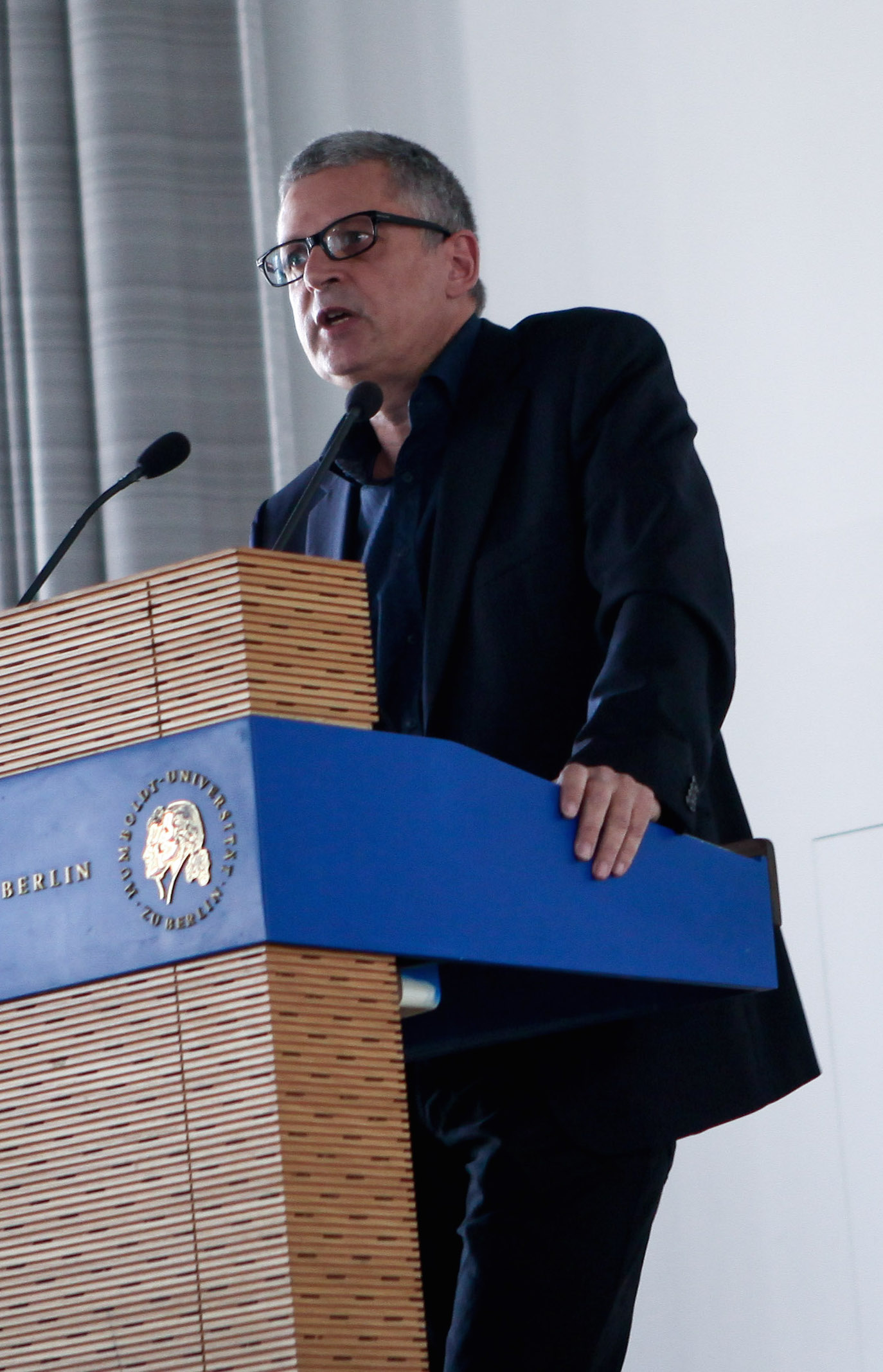 Flemming Rose na 2015 European Students For Liberty Conference v Berlíně